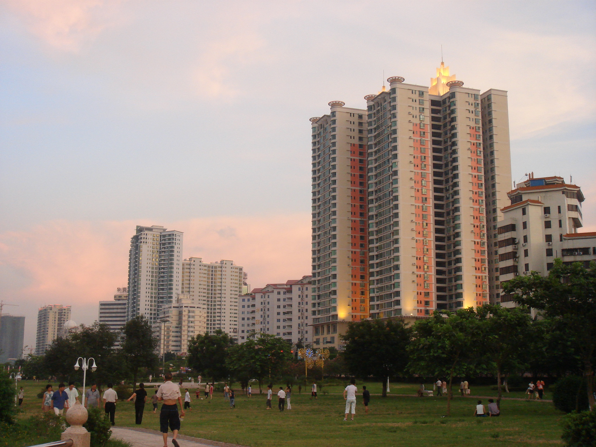 Qingyuan_Riverside_Park